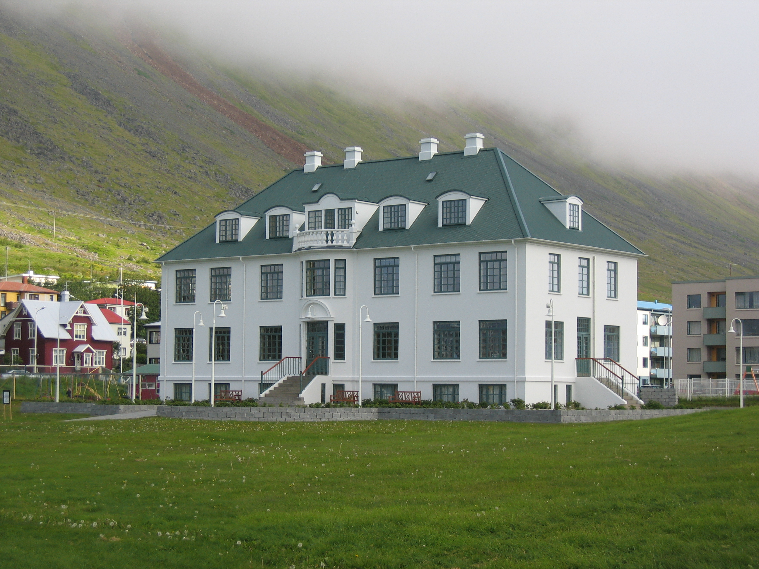 Ísafjörður spítali , Iceland Salvör Gissurardóttir July 2006